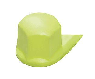 Der Dustite hat die gleiche Funktion wie der Checkpoint und schützt zusätzlich noch vor äußeren Einwirkungen wie Schmutz und Salz im Winter